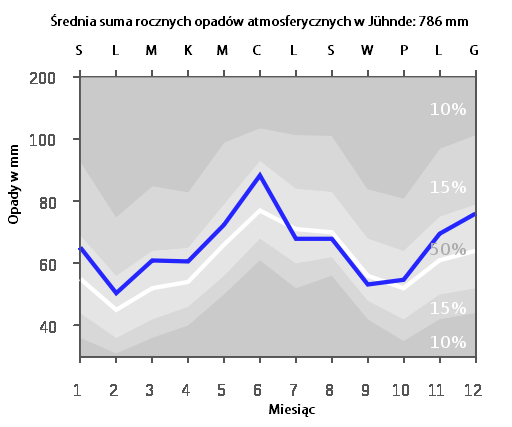 Średnie opady w Juehnde w latach 1961 - 1990, dane z DWD.